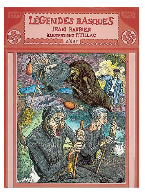 Jean Barbierren Légendes Basques obraren argitalpen elebidunaren (frantsesez eta euskaraz) azala; Parisen 1931n eman zen argitara bertsio hau, eta 1983an faksimile edizioa kaleratu zen.